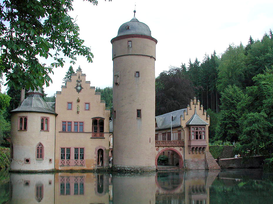 Wasserschloss in Mespelbrunn, Spessart, u. a. Drehort von Das Wirtshaus im Spessart, Außenansicht